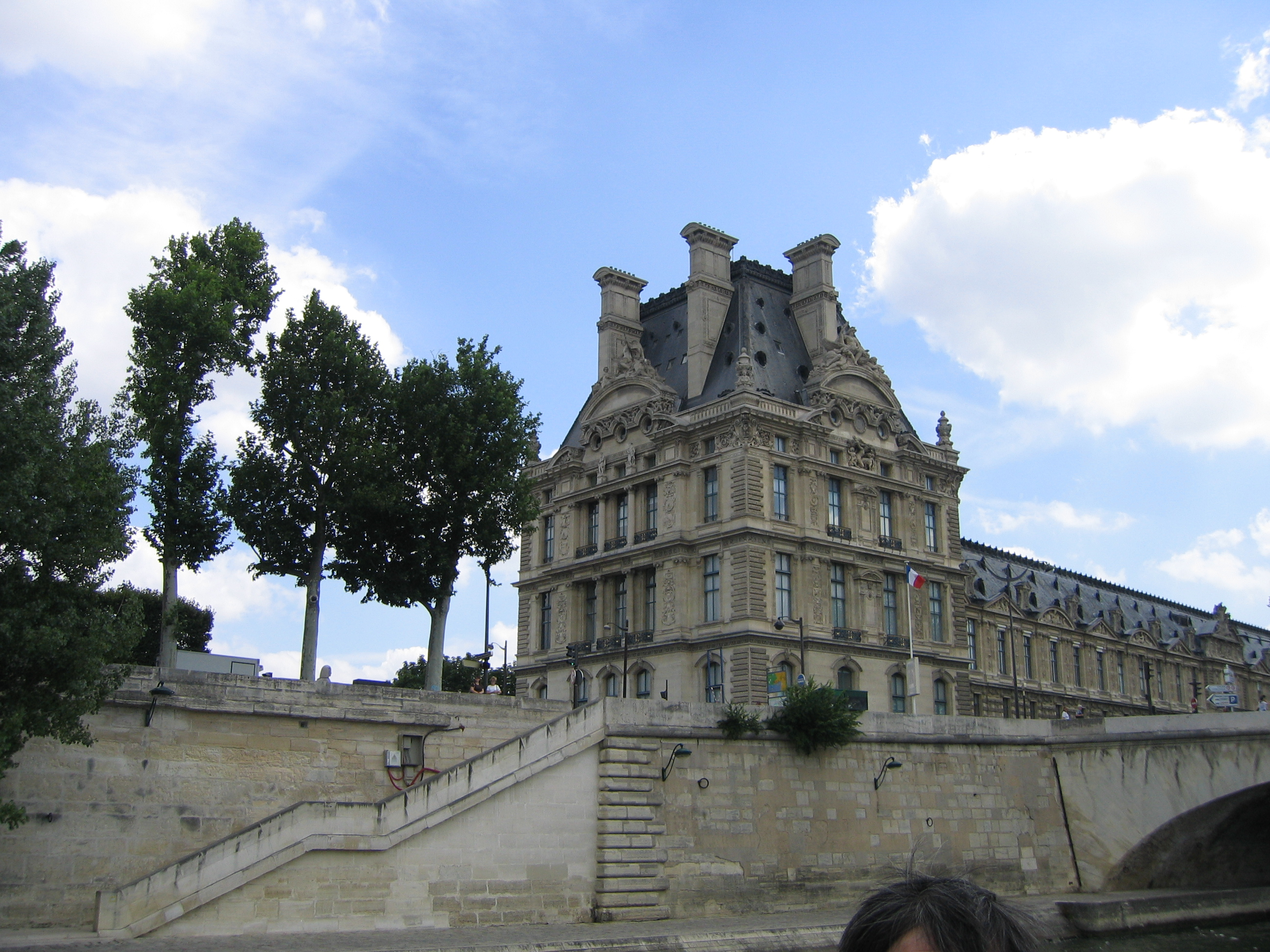 Paris Palais du Louvre Pavillon de Flore